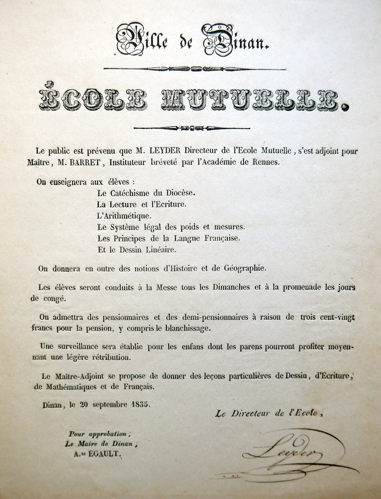 Affiche concernant l'école mutuelle de Dinan (Côtes-d'Armor, France) 1833. Archives municipales de Dinan.